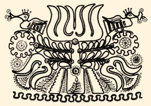 Bakonyi szűr díszítésének részlete.